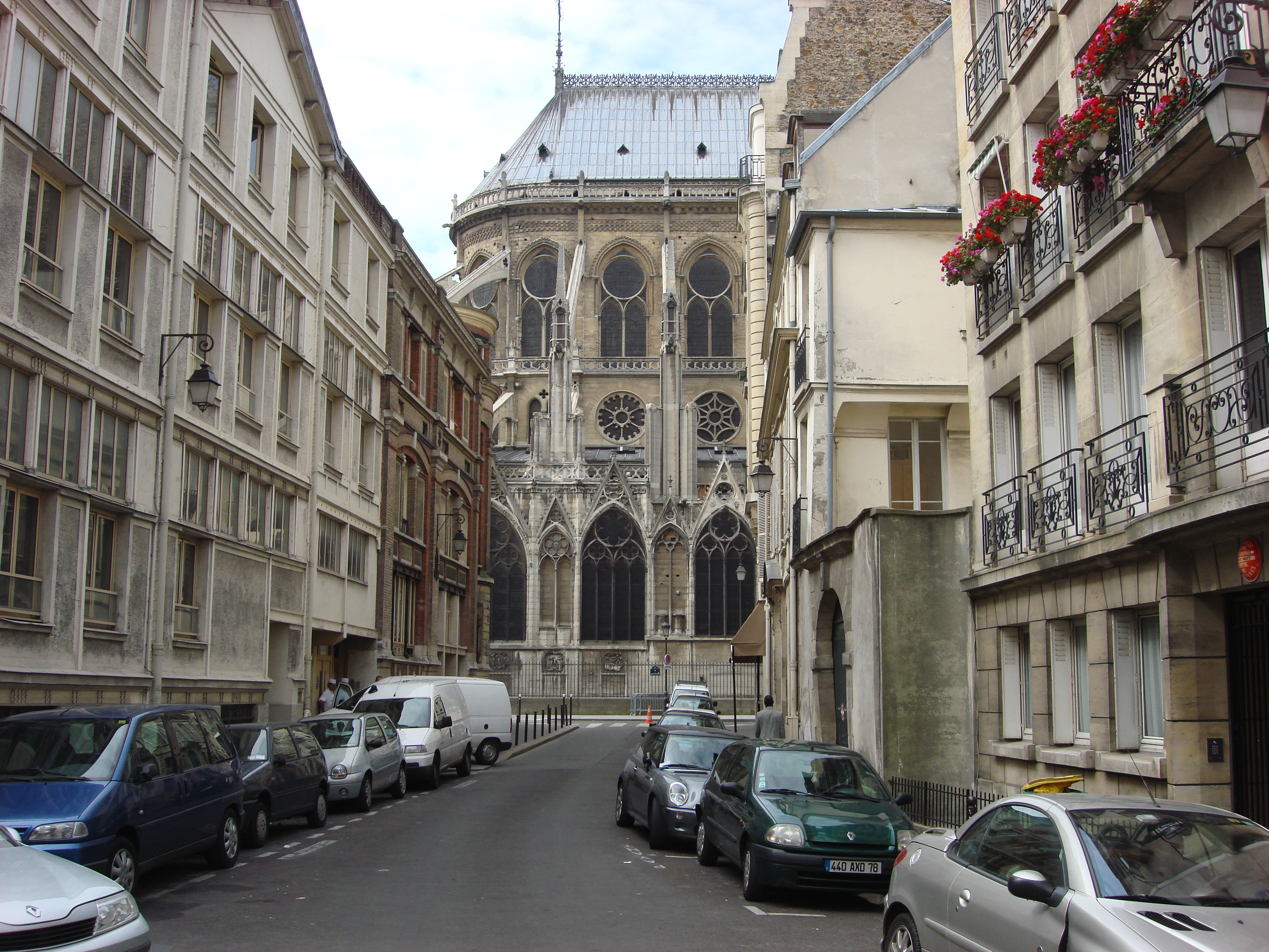 Notre Dame